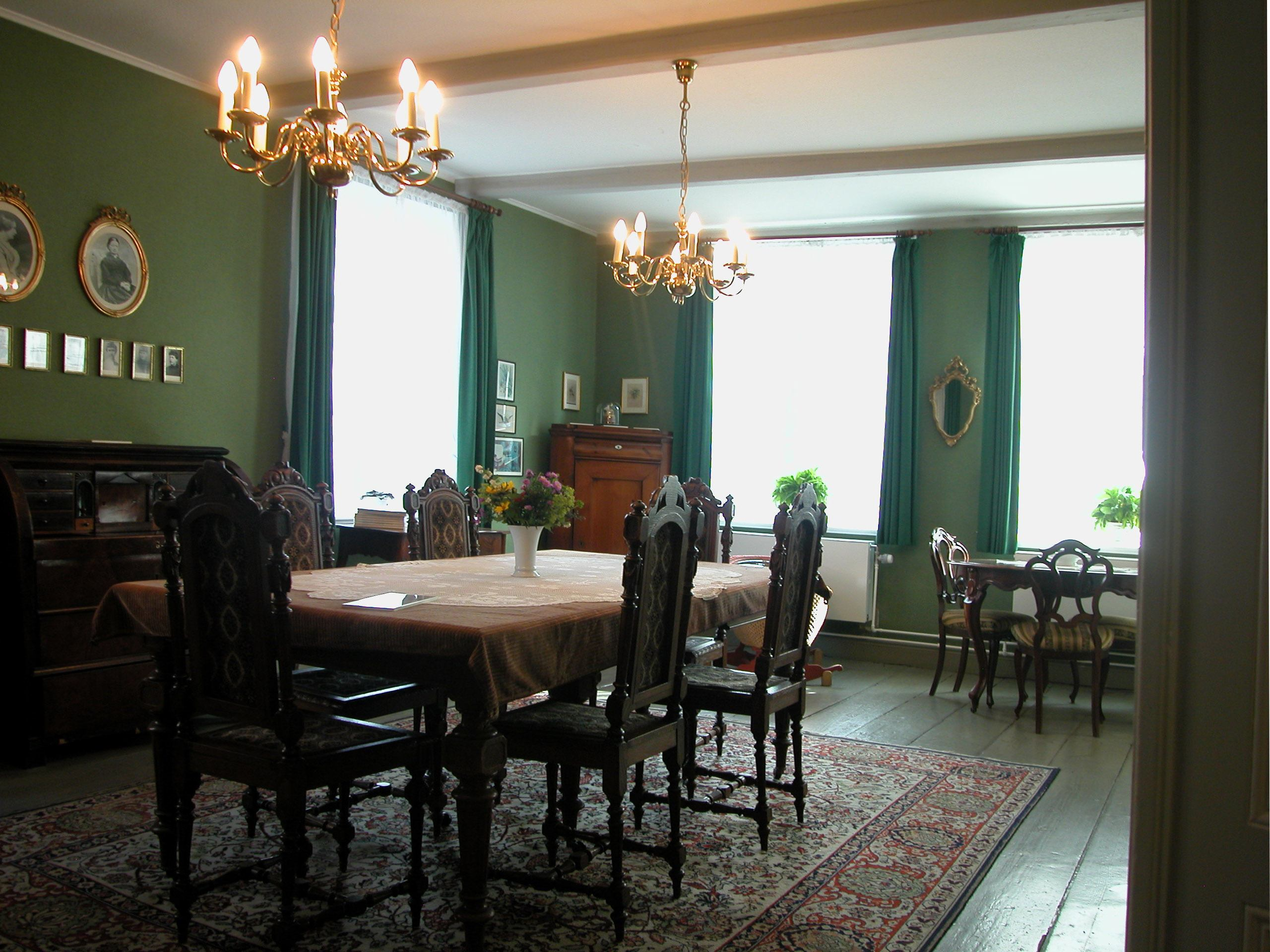 Theodor-Storm-Haus, Wohnzimmer Standort:54°28′32.3″N 9°02′50.5″E / 54.475639°N 9.047361°E